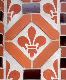 Lilien-Ornamentik (Bezug zum Ort Wilmersdorf) am Portal der Auenkirche in Berlin-Wilmersdorf